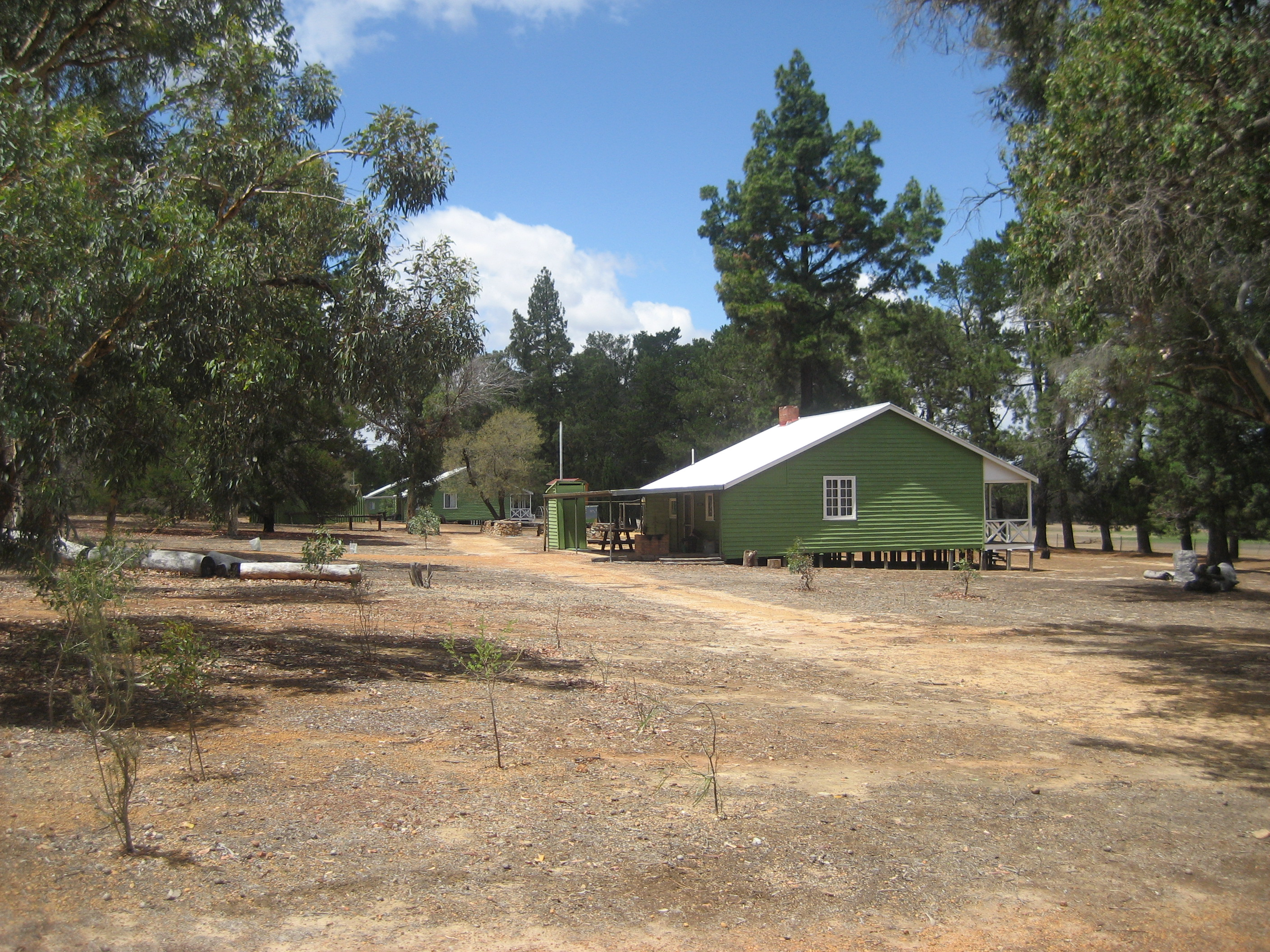 Dryandra Woodland Lions village